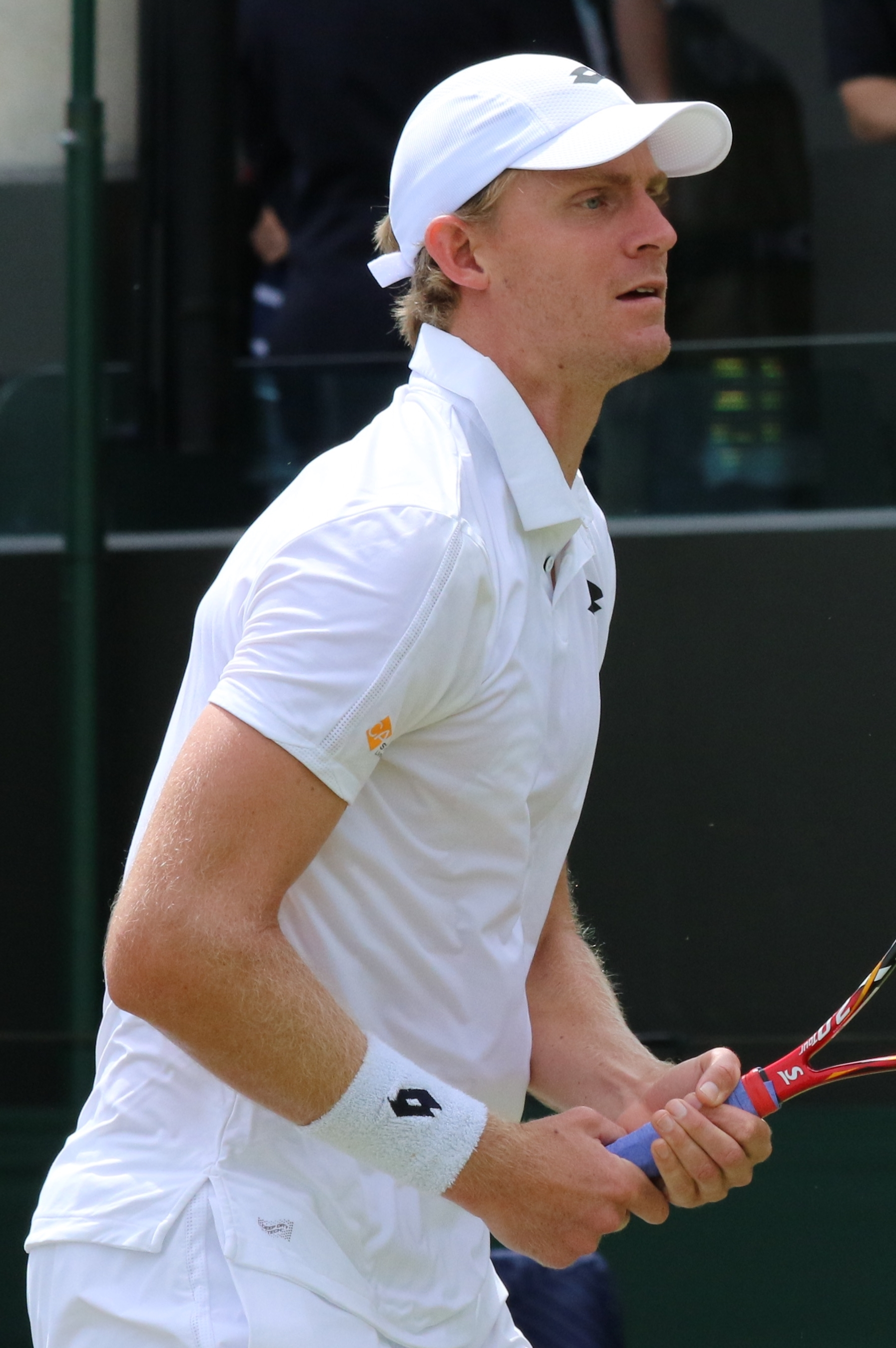 Anderson WM16 (30)